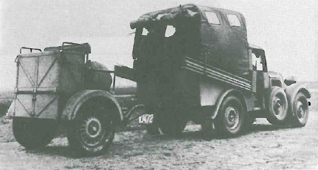 Samochód Polski Fiat 508/518 dla zmotoryzowanego patrolu telefonicznego [opis oryginalny]